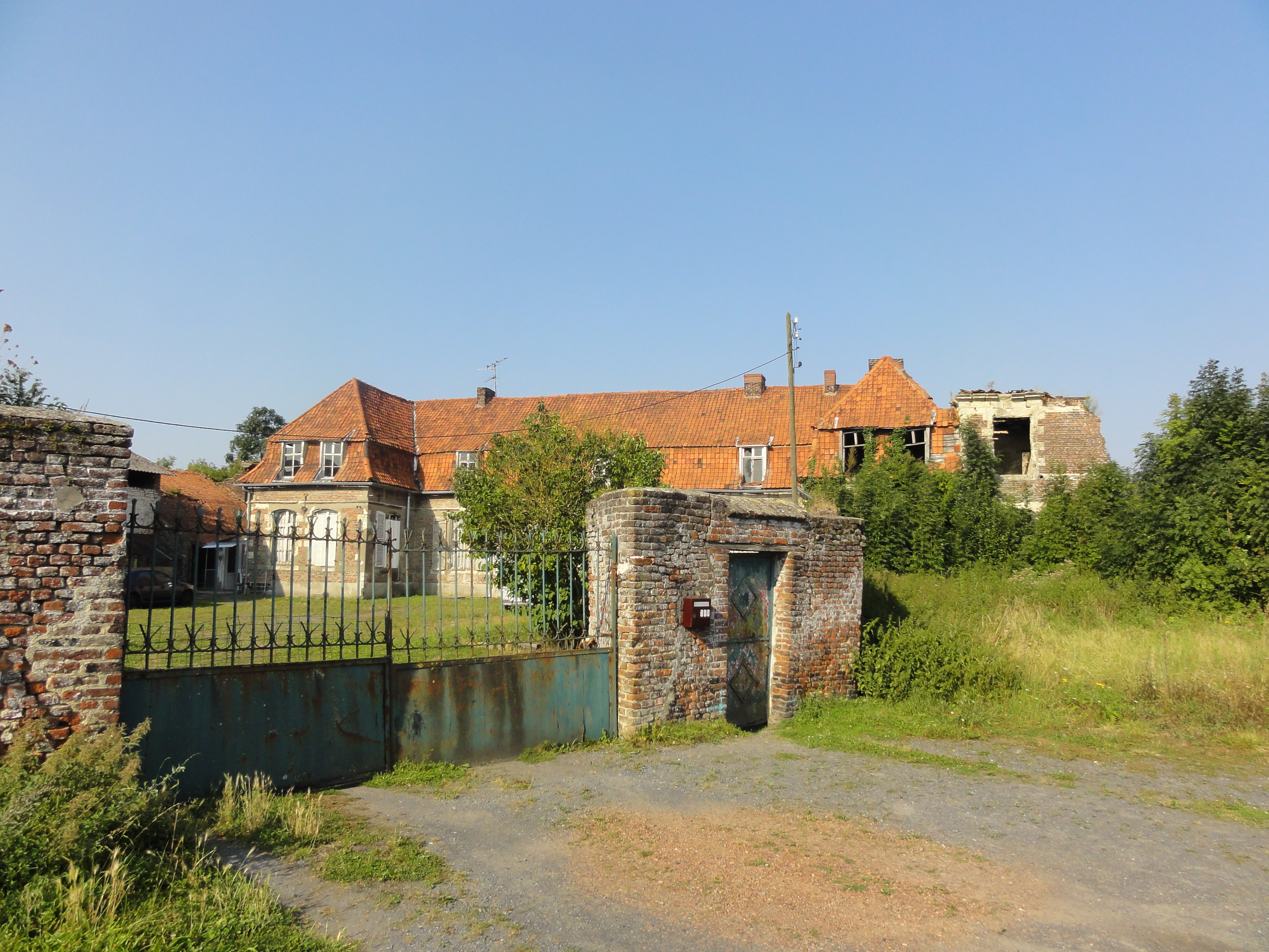 Château des Douaniers, Compagnie des mines d'Anzin, Fresnes-sur-Escaut, Nord, Nord-Pas-de-Calais, France. Depicted place: Château des Douaniers .